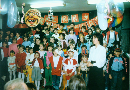 Първото тържество за Коледа в езиковия център на „АВО-3“, 1990 г.